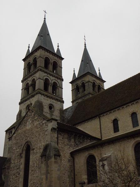 Flanc nord de la collégiale Notre-Dame de Melun (77).